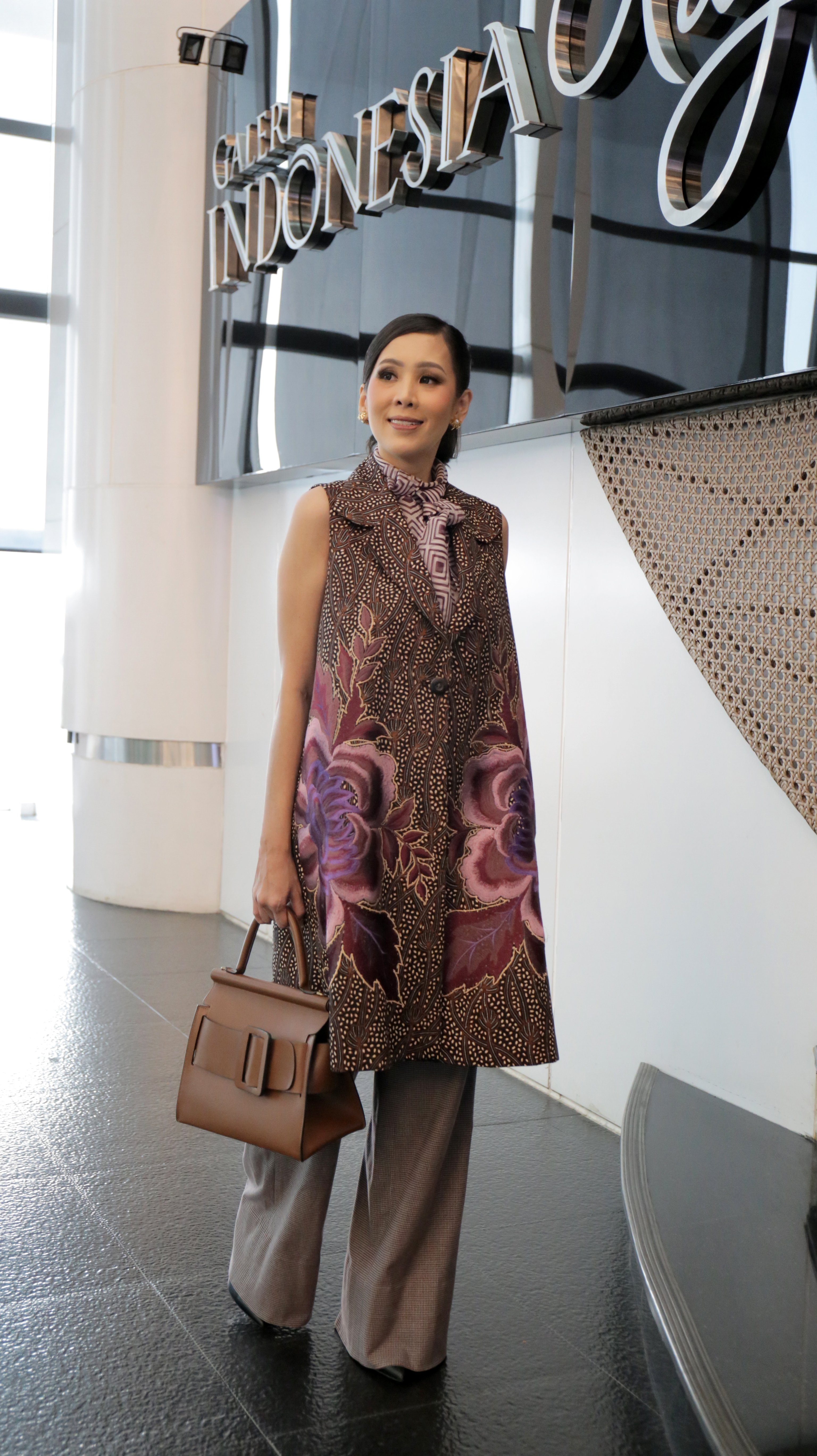 Renitasari Adrian - Program Director Bakti Budaya Djarum Foundation